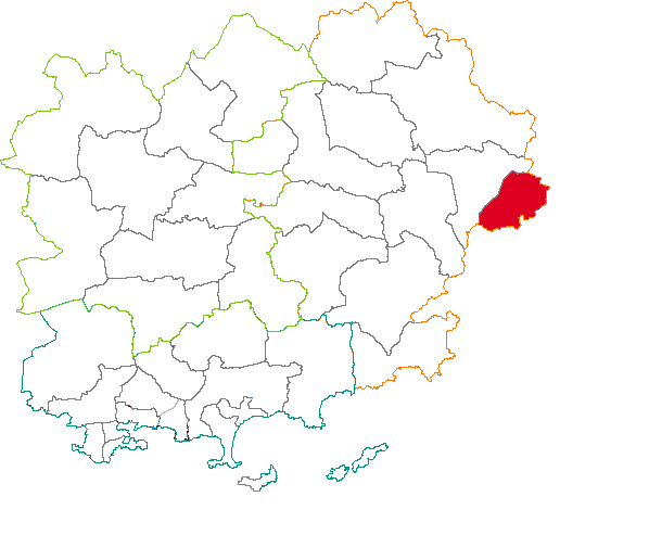 Situation du canton dans la département du Var (83), France